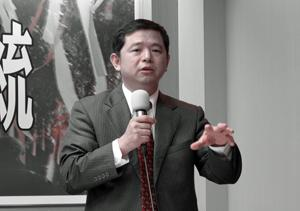 2010年10月6日，台灣律師鄭文龍解釋陳水扁應獲釋的理由。